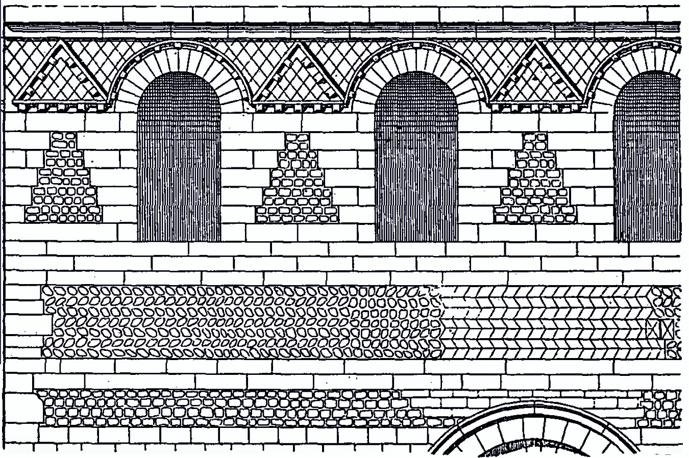 Eglise de Cravant-les-Côteaux,détail du mur (imagedudomaine public modifiée)